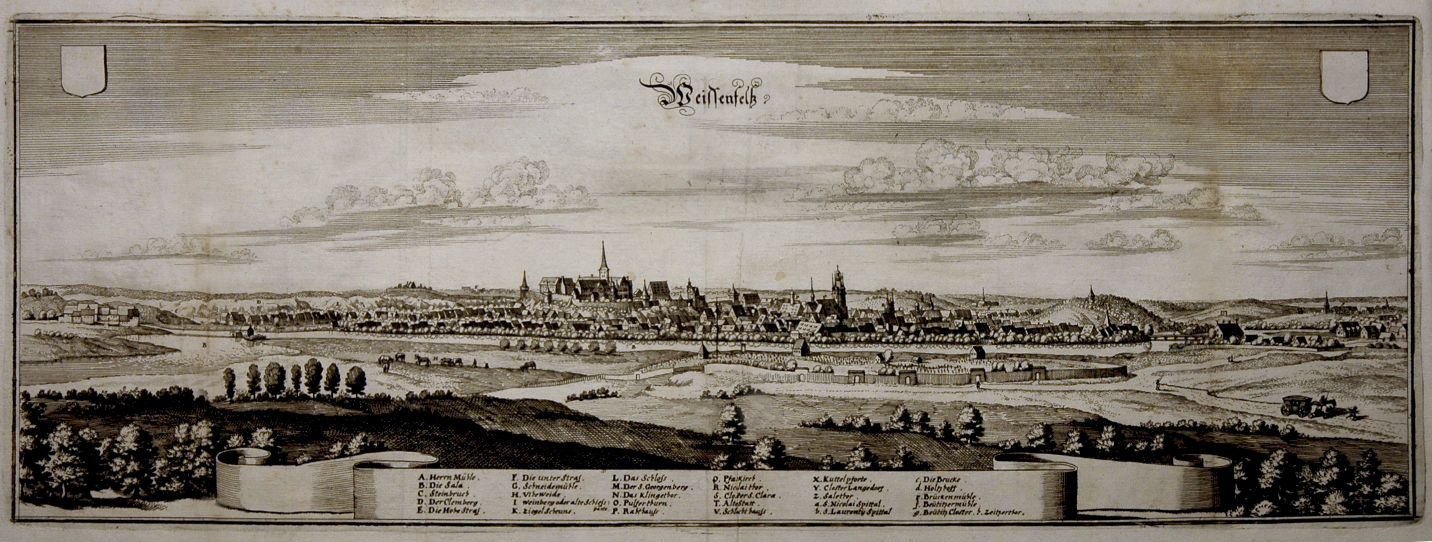 Weißenfels um 1650; Kupferstich 19 x 51,5 cm von Matthäus Merian 1647